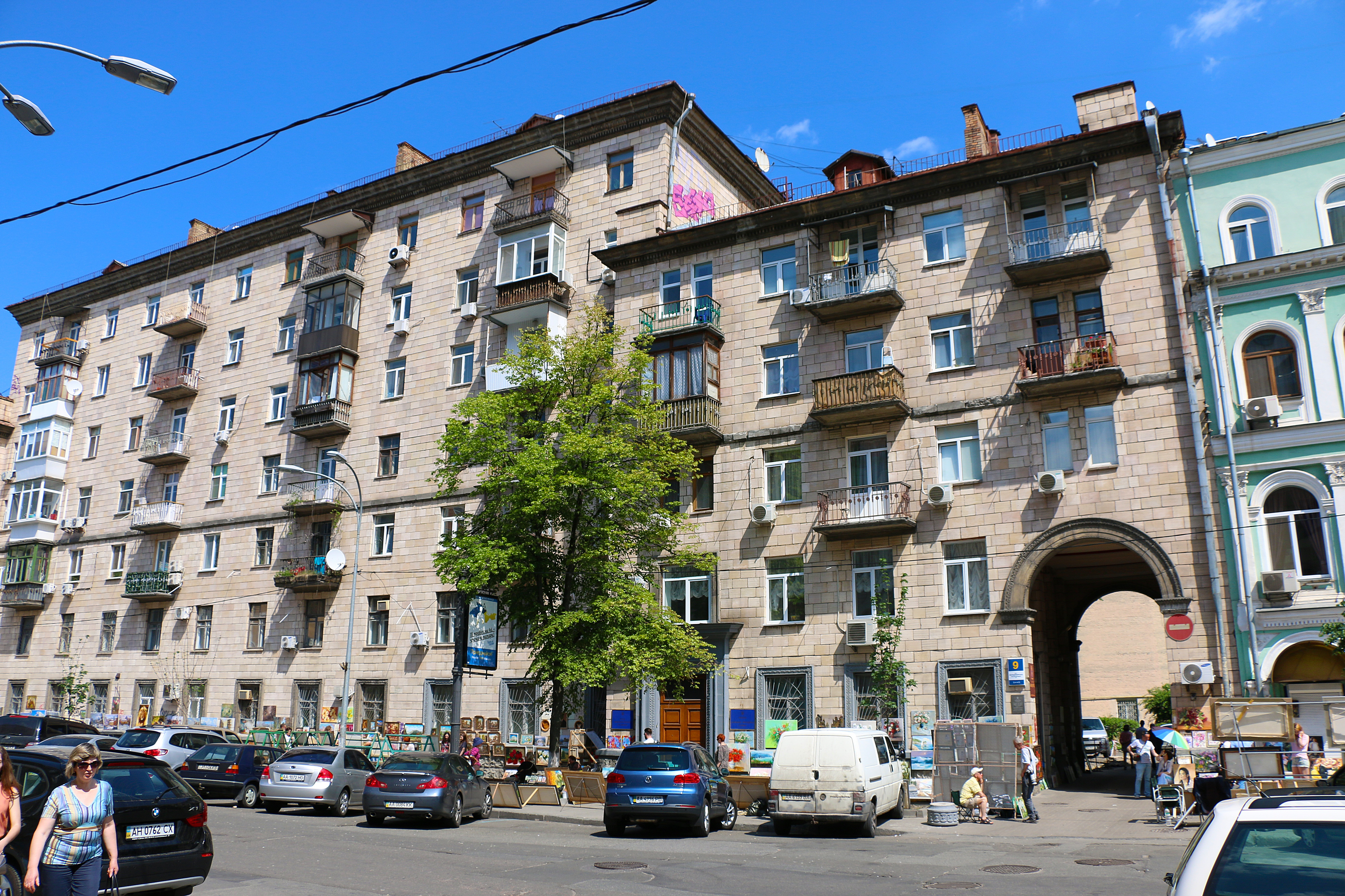 Будинок житловий, в якому у 1972–1997 рр. проживав художник М. Г. Дерегус, Київ, Володимирська вул., 9